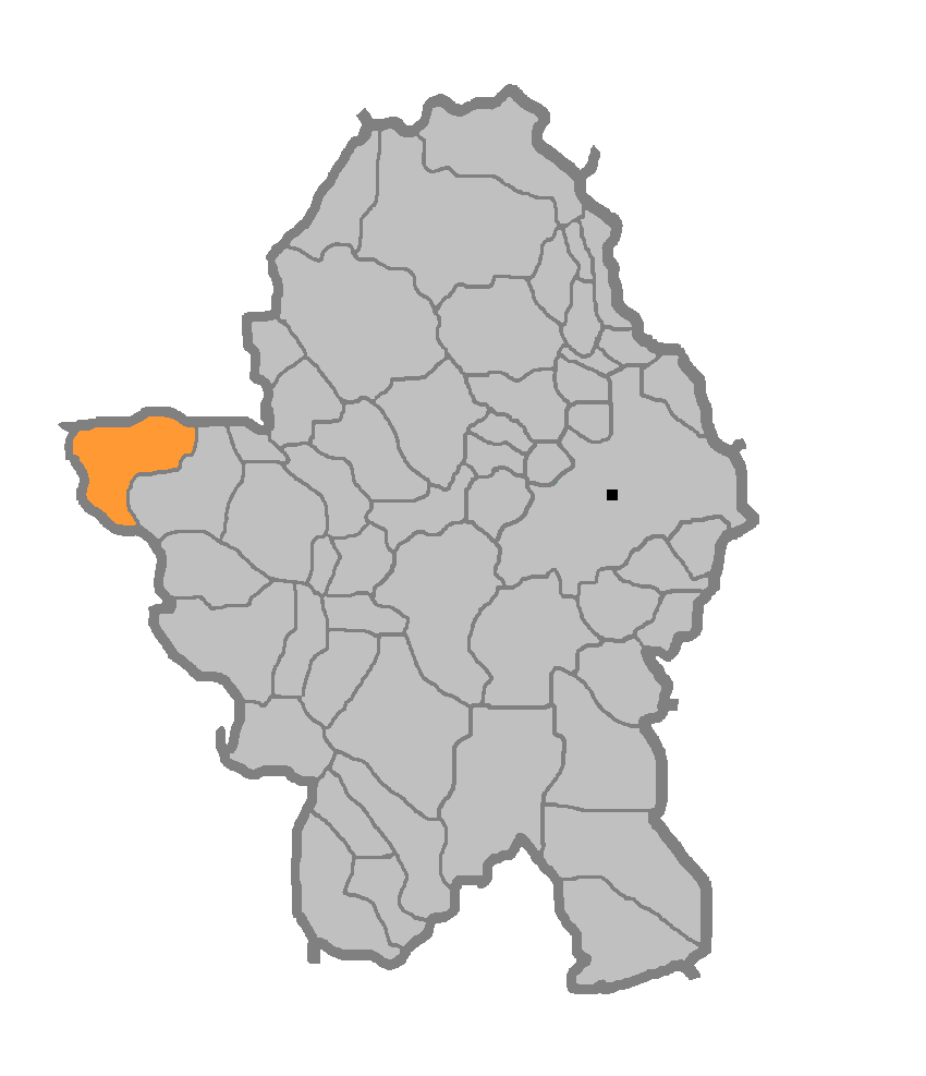 Мјесна Заједница Стратинска